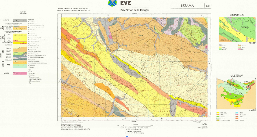 Mapa Geologikoa